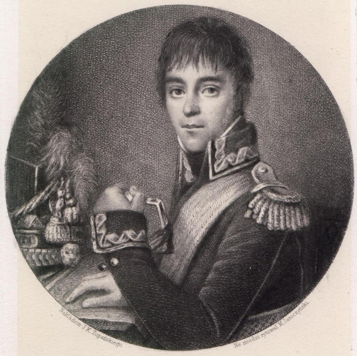 Portret gen. Kosińskiego w miedziorycie M. Jaroczyńskiego